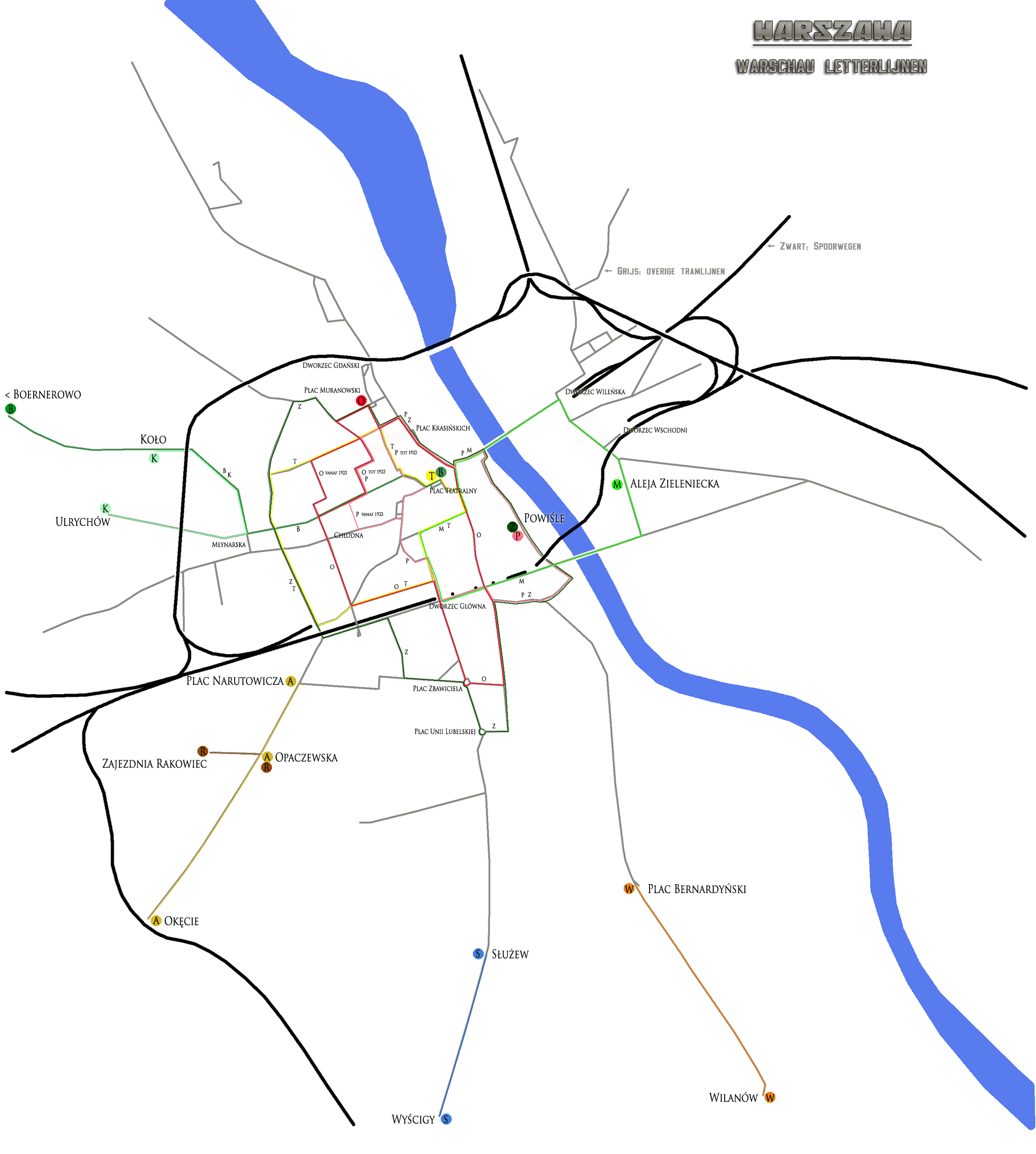 Overzicht van de belangrijkste lettertramlijnen in Warschau